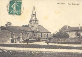 Vrécourt (Vosges - France) : l'église et la place du marché